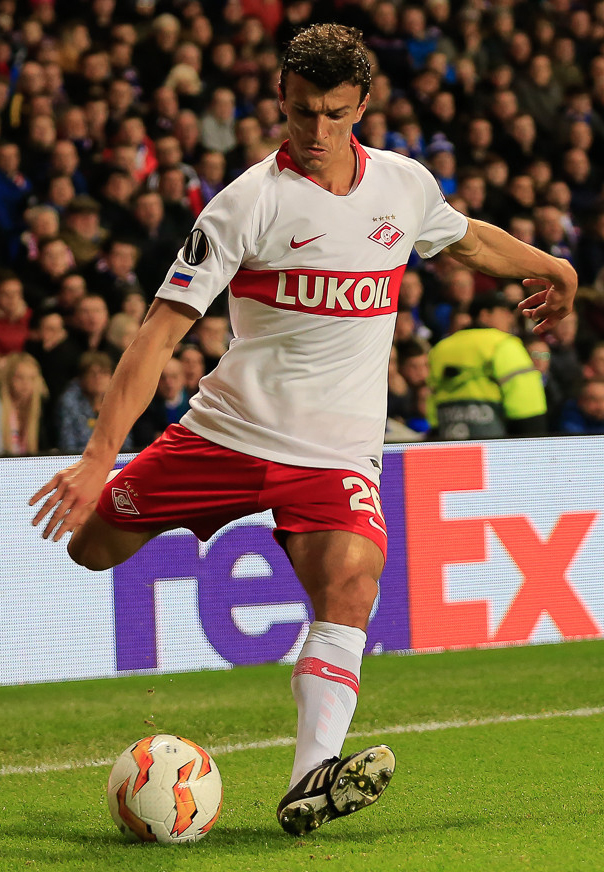 Первый матч Рианчо у руля «Спартака» завершился вничью. Репортаж из Глазго